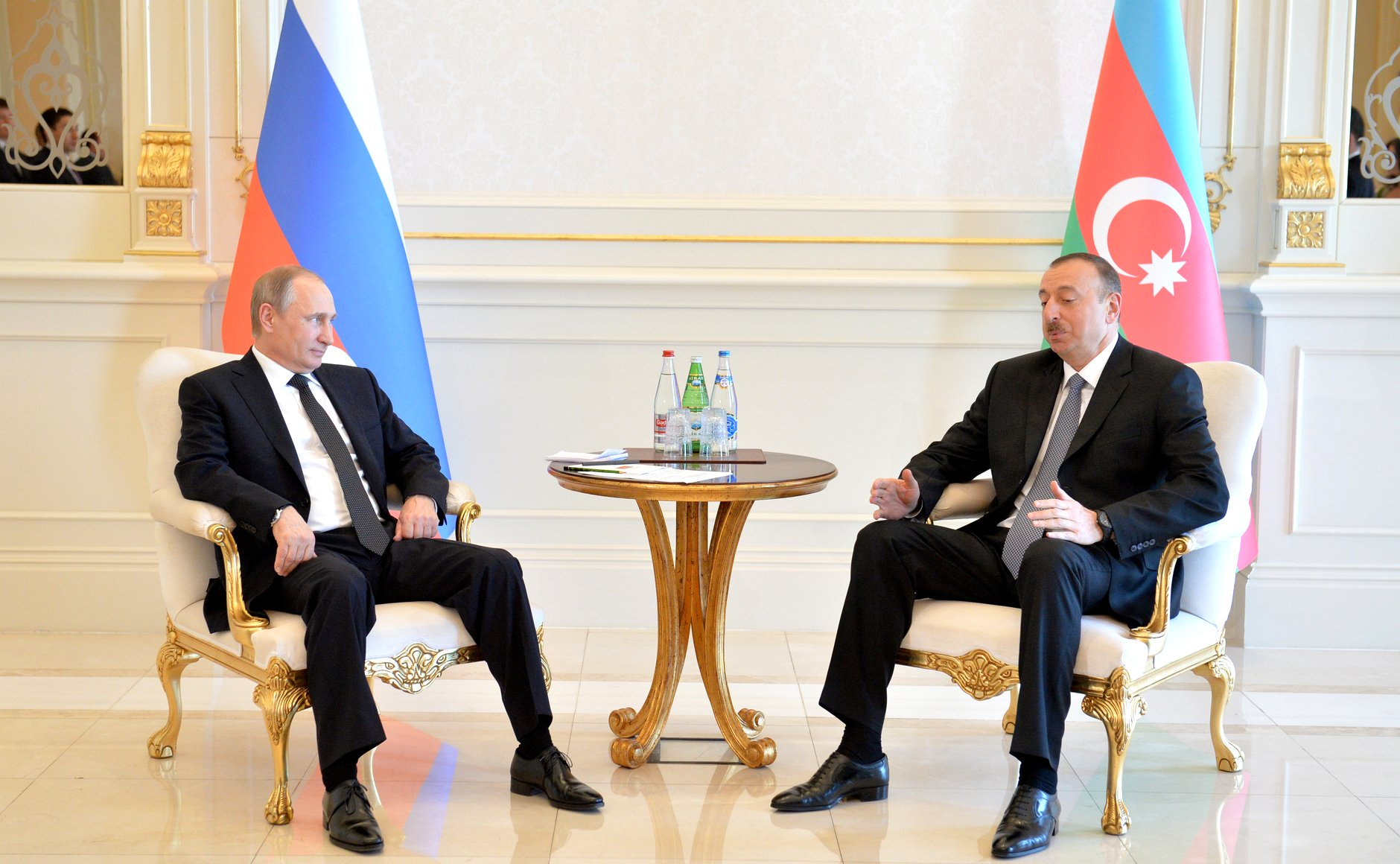 Встреча Президента России Владимира Путина с Президентом Азербайджана Ильхамом Алиевым